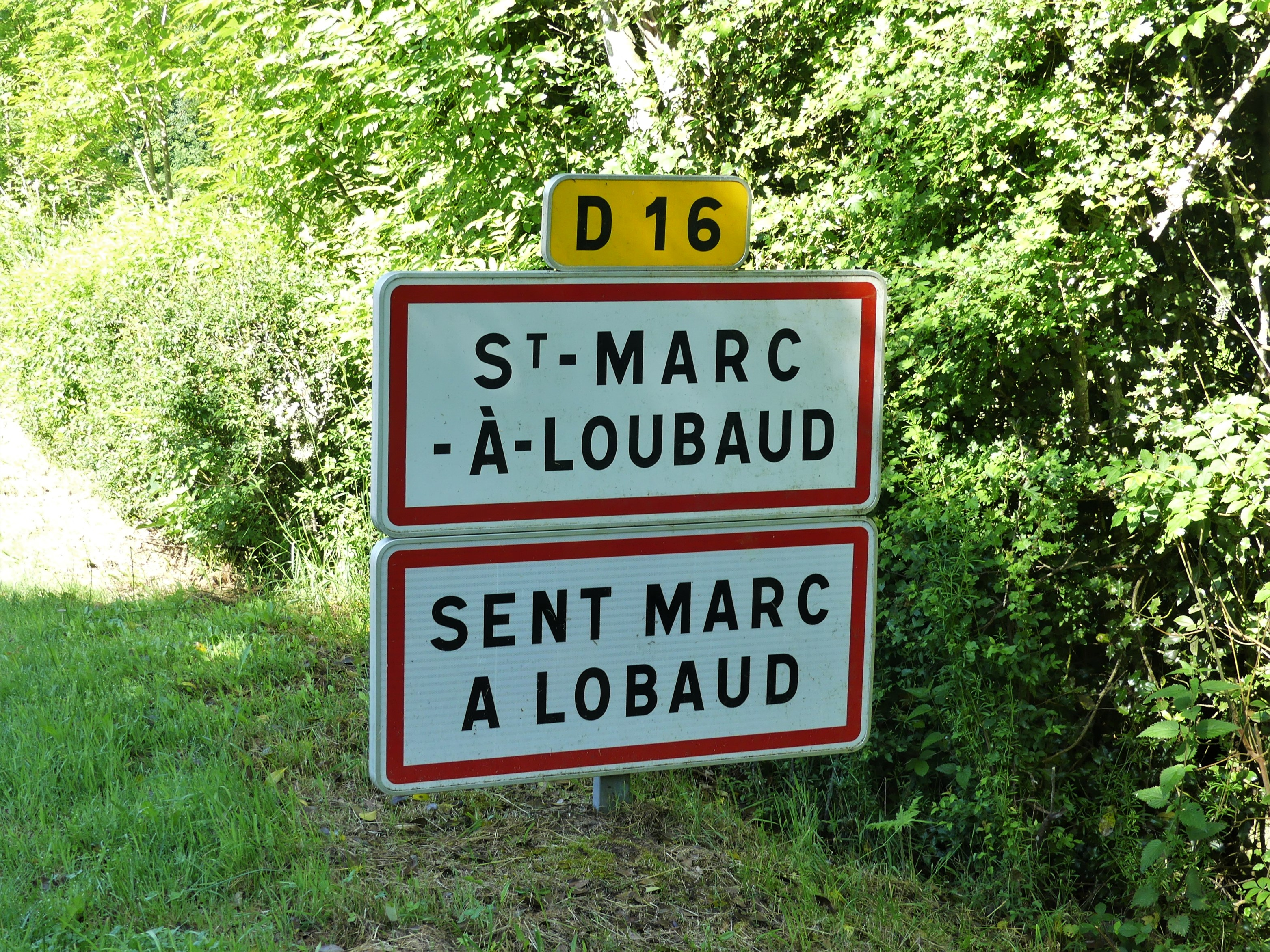 Panneau d'entrée du bourg de Saint-Marc-à-Loubaud en français et en occitan, Creuse, France.